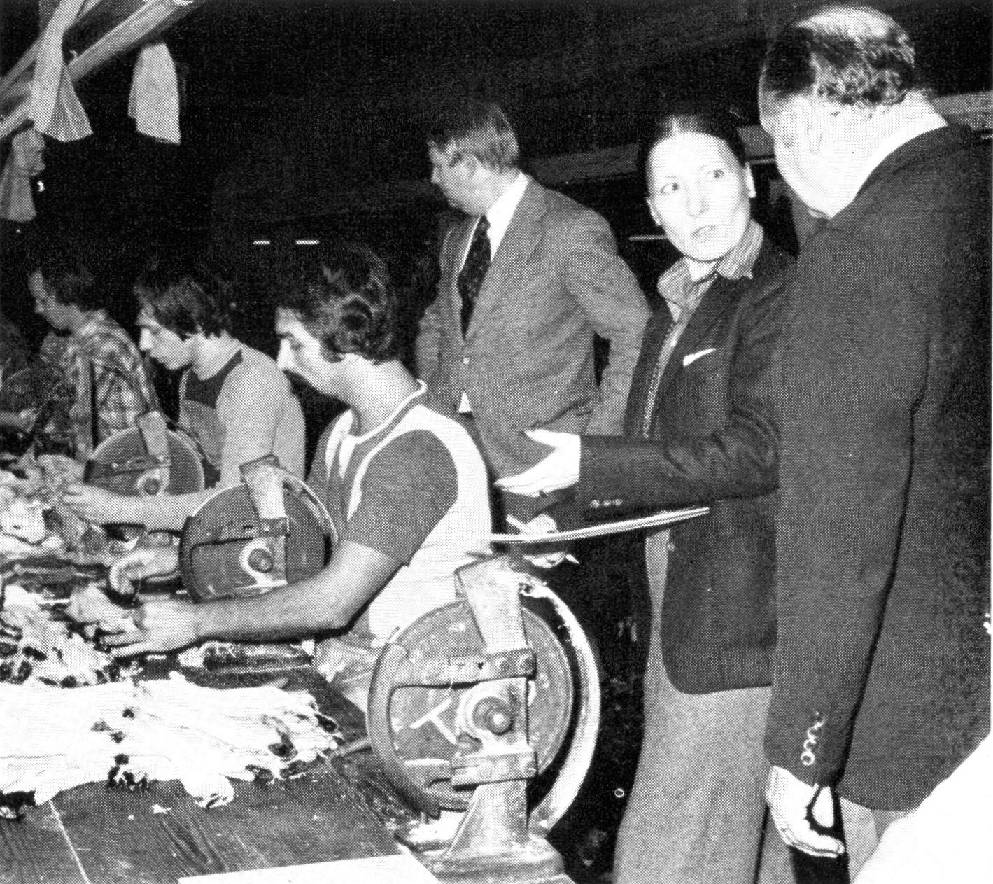 Pelz-Zurichter beim Dünnschneiden, Thorer & Co, Offenbach, 1977. Zum 23. November 1977 hatte die deutsche Rauchwarenindustrie die Fachpresse in die Firma Thorer nach Offenbach eingeladen. Die im Fachverband Rauchwarenveredlung zusammengeschlossenen Unternehmen hatten im Jahr 1976 mit ihren 3700 Beschäftigten die Rekordzahl von 27.8 Millionen Fellen bearbeitet.